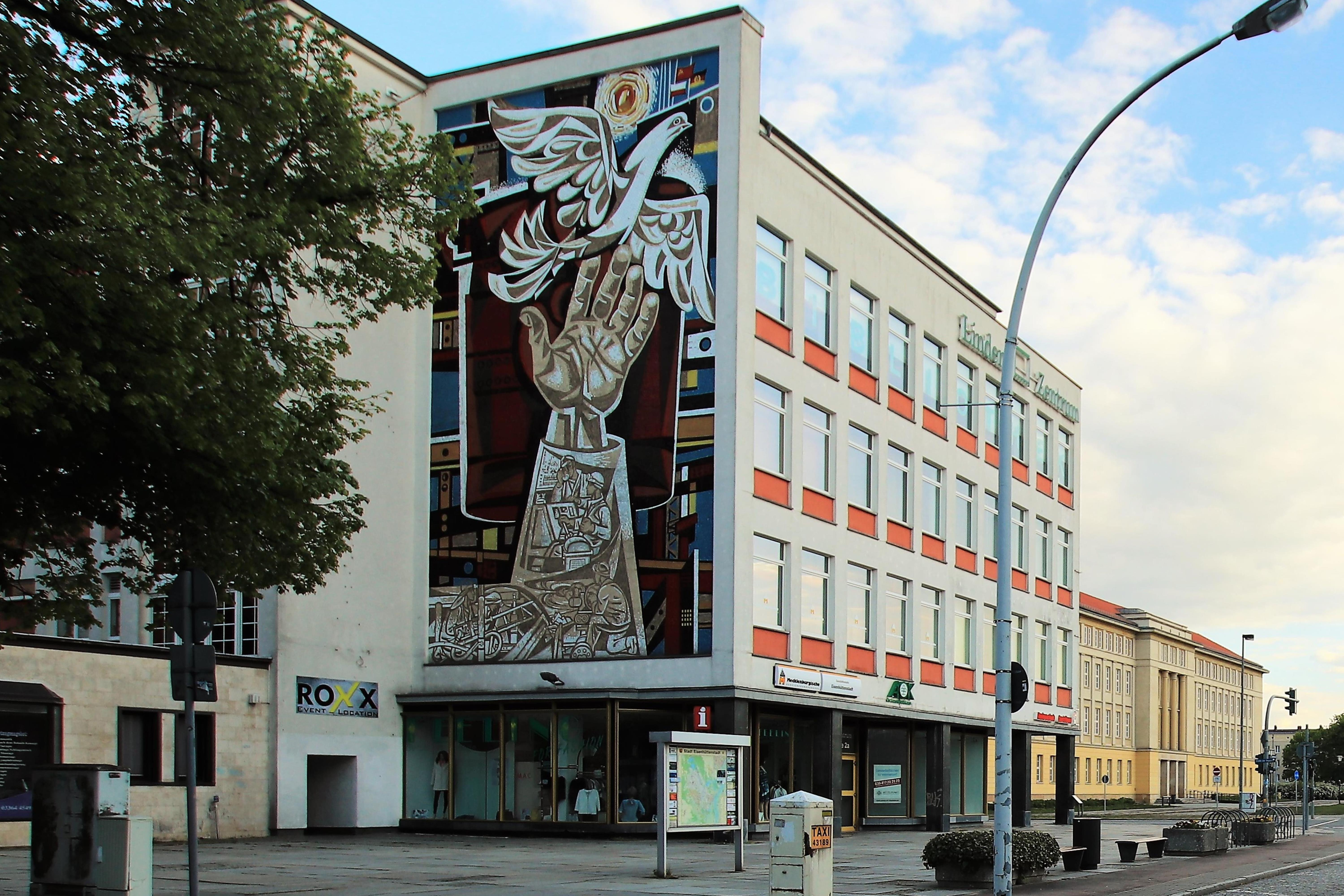 Wandmosaik von Walter Womacka am Linden-Zentrum, ehem. Kaufhaus "Magnet" in der Leninallee